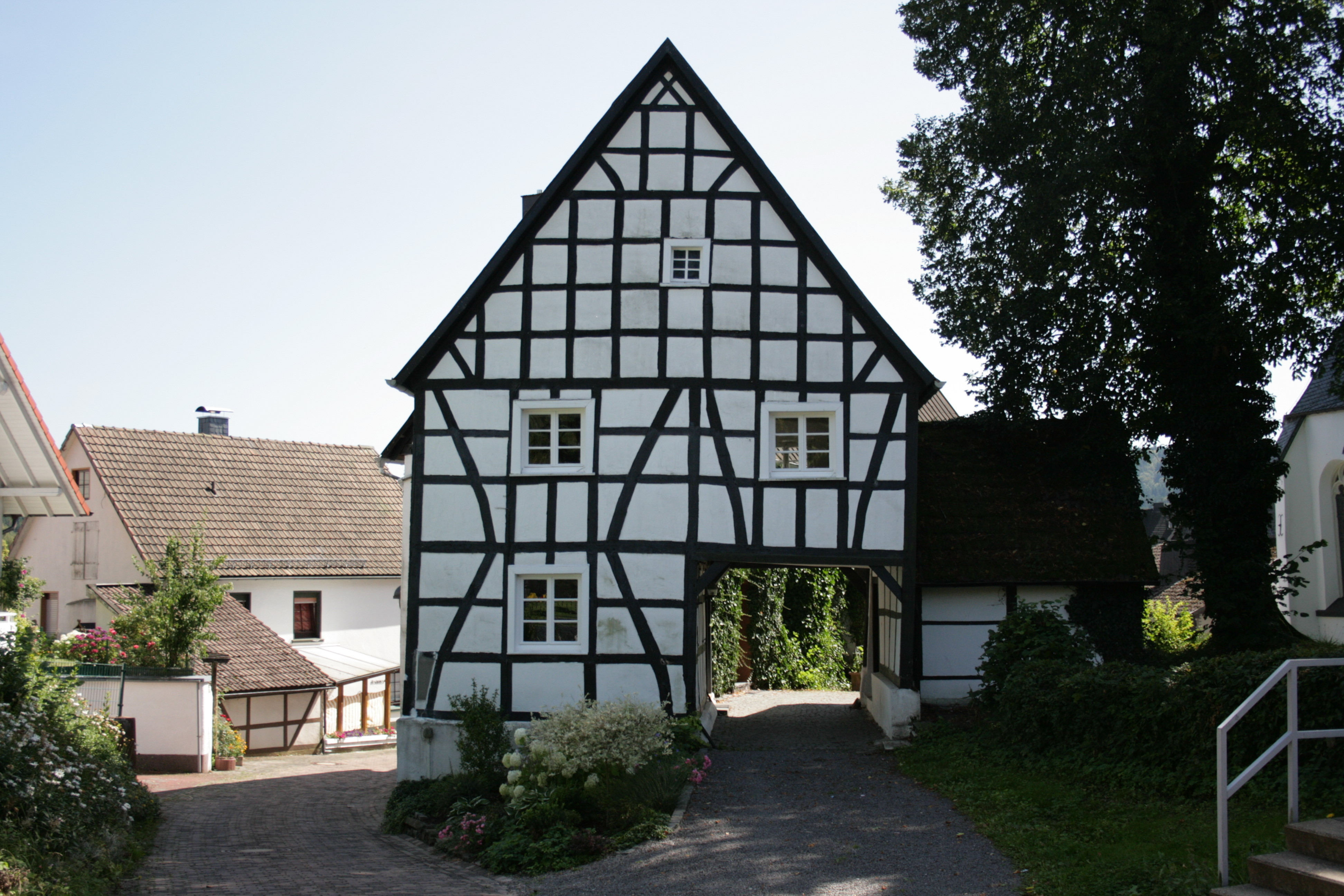 Spieker, Am Spieker in Herscheid